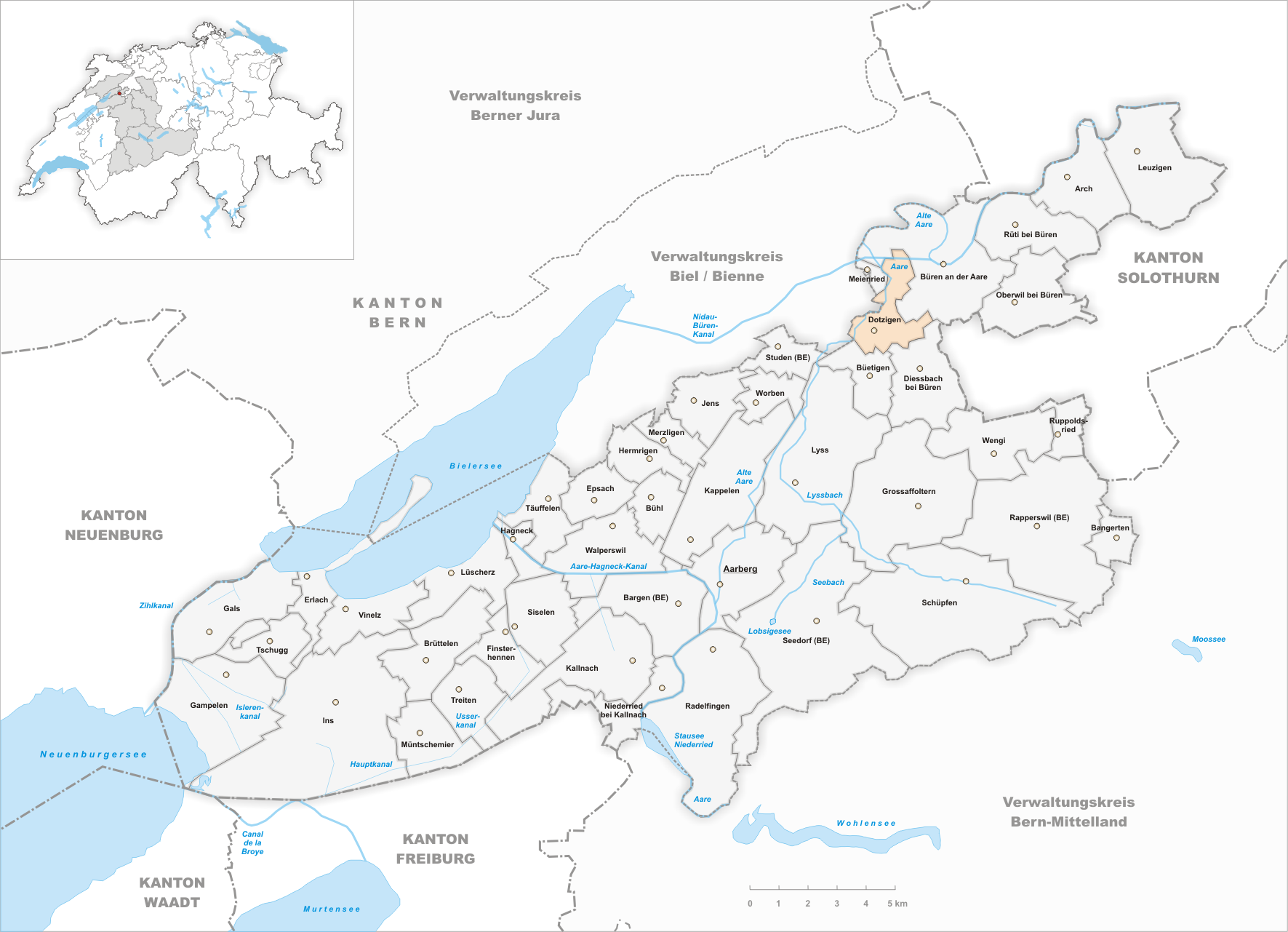 Municipality Dotzigen